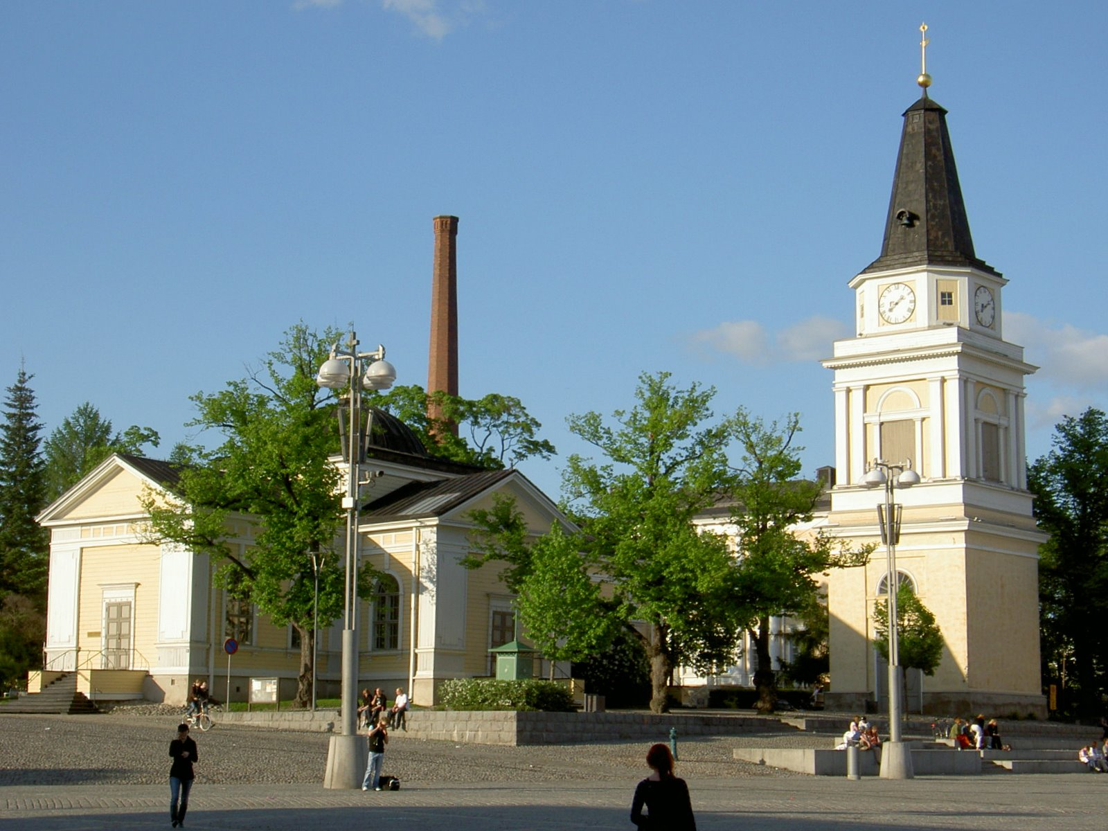 Vanha kirkko, Tampere, Finland.